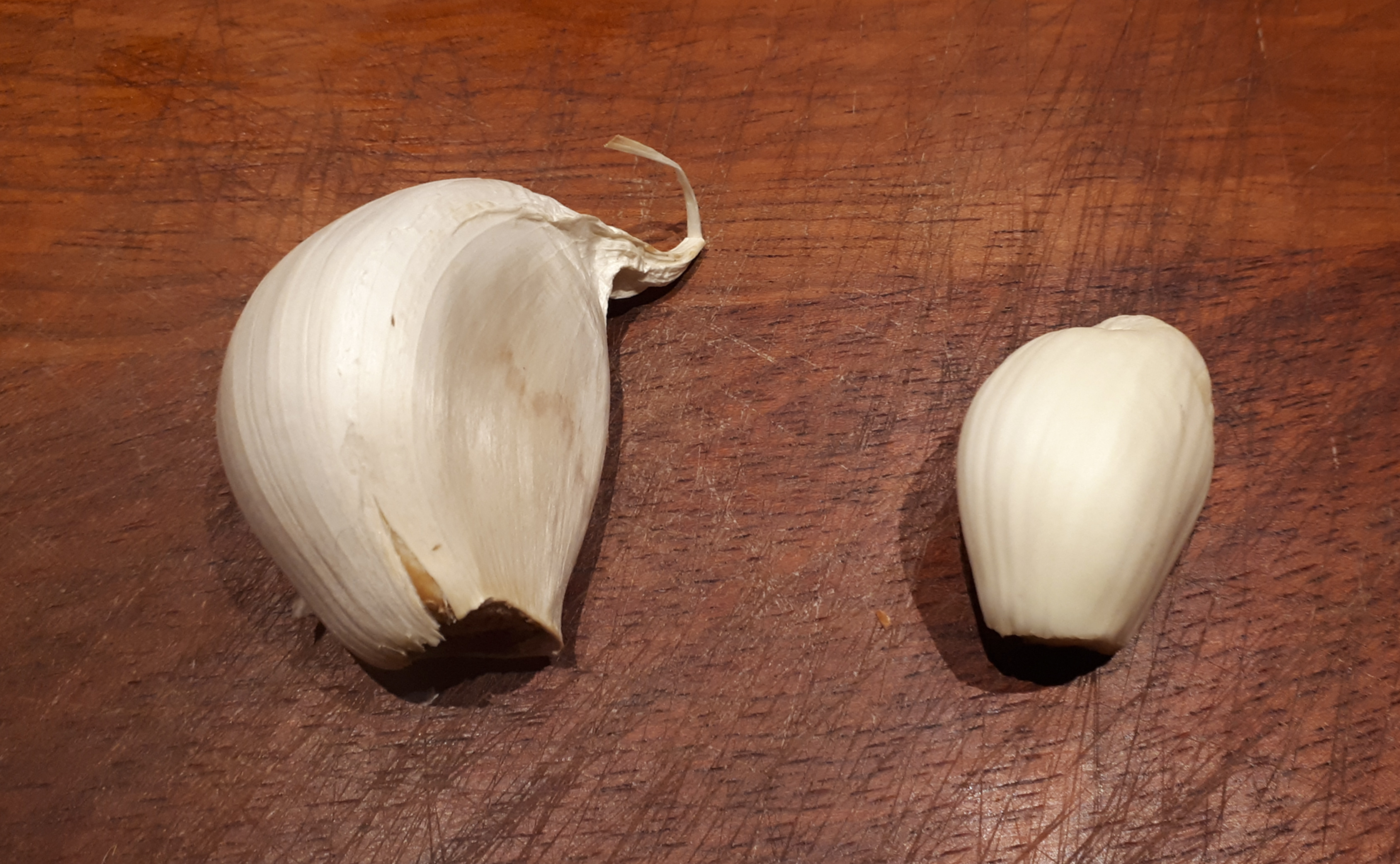 Ail en chemise (à gauche) et ail épluché (à droite)